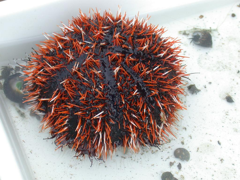 Tripneustes gratilla：シラヒゲウニ 2007/08/30 和歌山県田辺市：Tanabe City. Wakayama pref. Japan